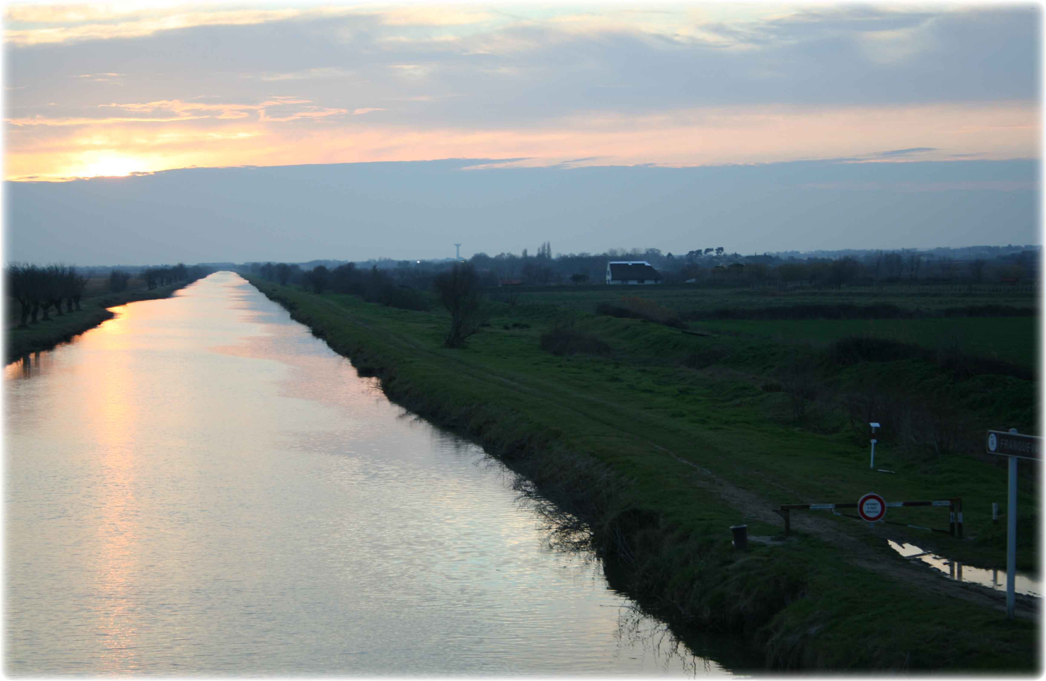 Franquevaux - Canal du Rhone a Séte Auteur: R. BENEZET Date : 21 02 2007